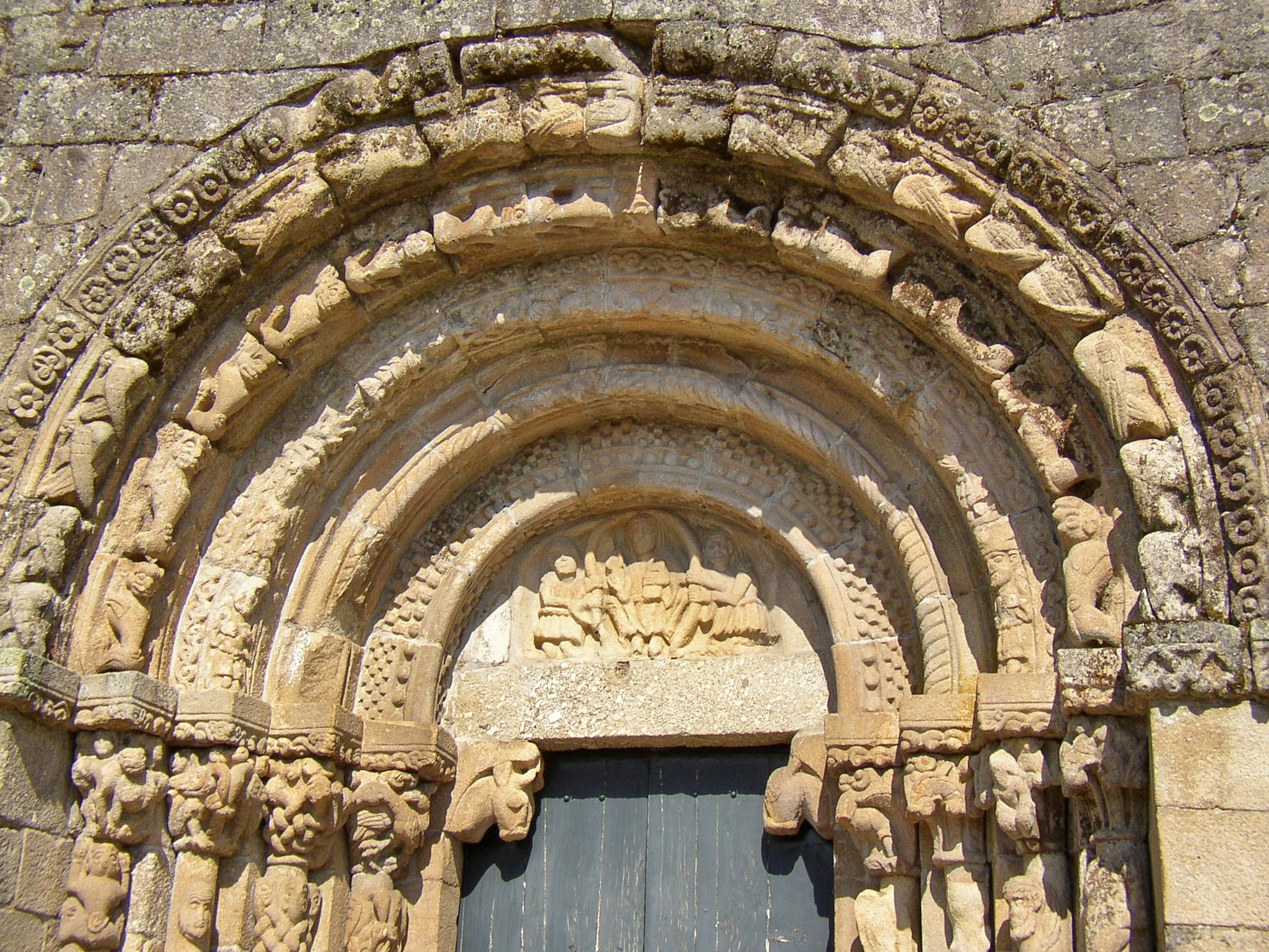 Igreja de Bravães This file was uploaded for Wiki Loves Monuments in Portugal with the unique identifier 69876.